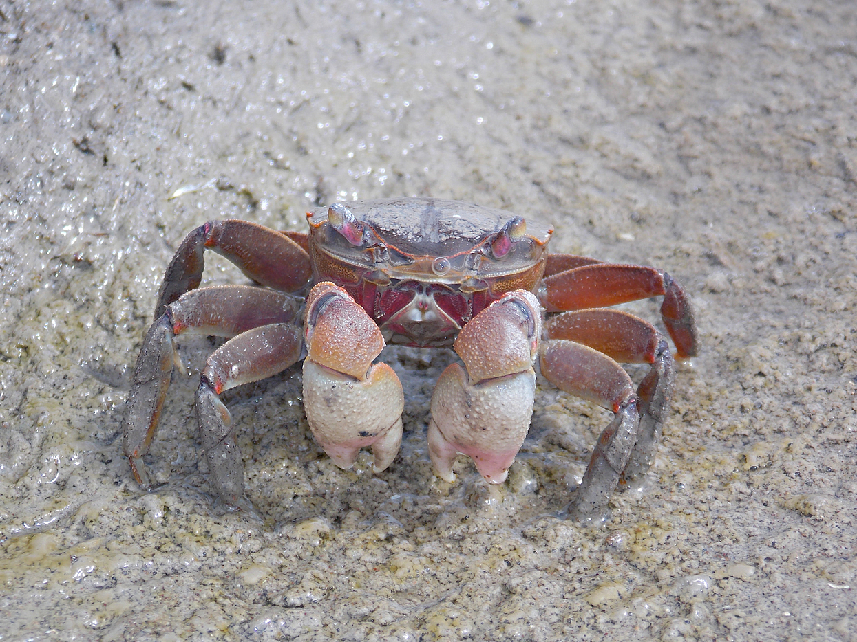 Ejemplar adulto de Chasmagnathus granulatus fotografiado en Punta Rasa, Buenos Aires, Argentina.